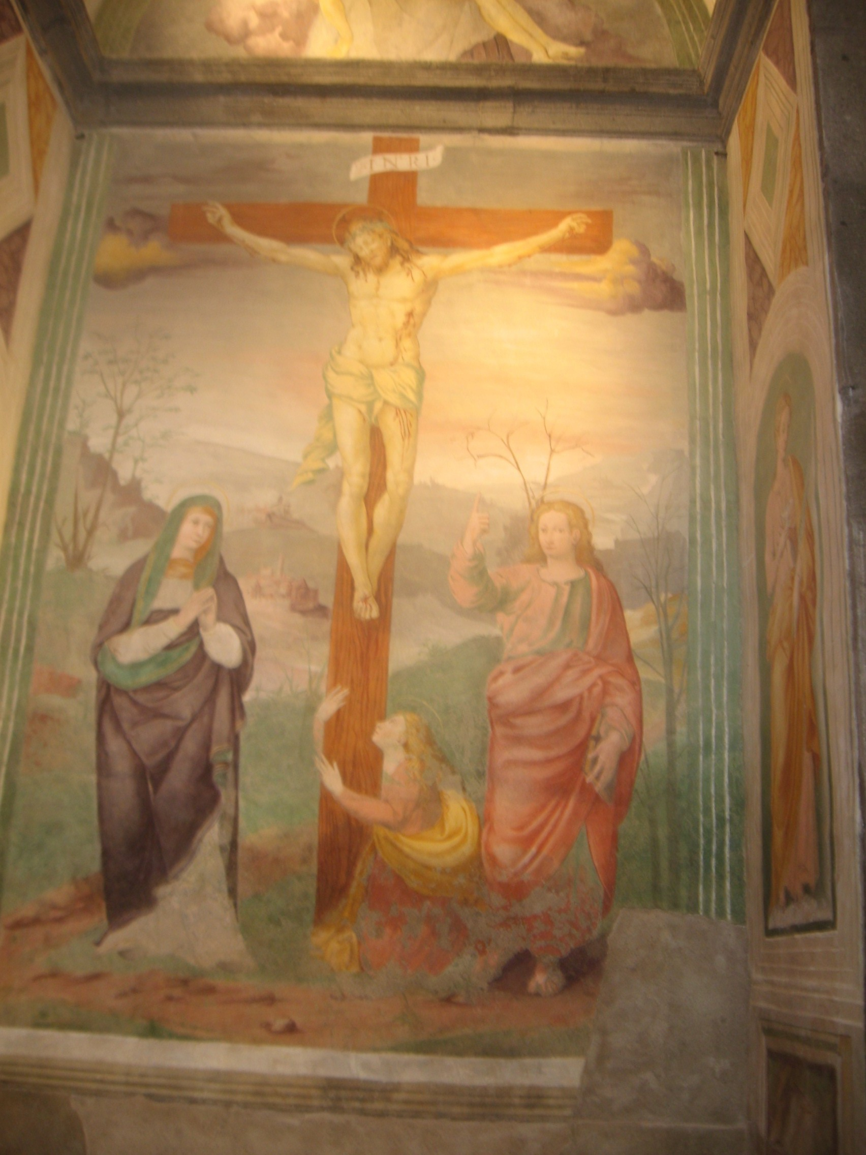 Affresco raffigurante la Crocifissione di Cristo